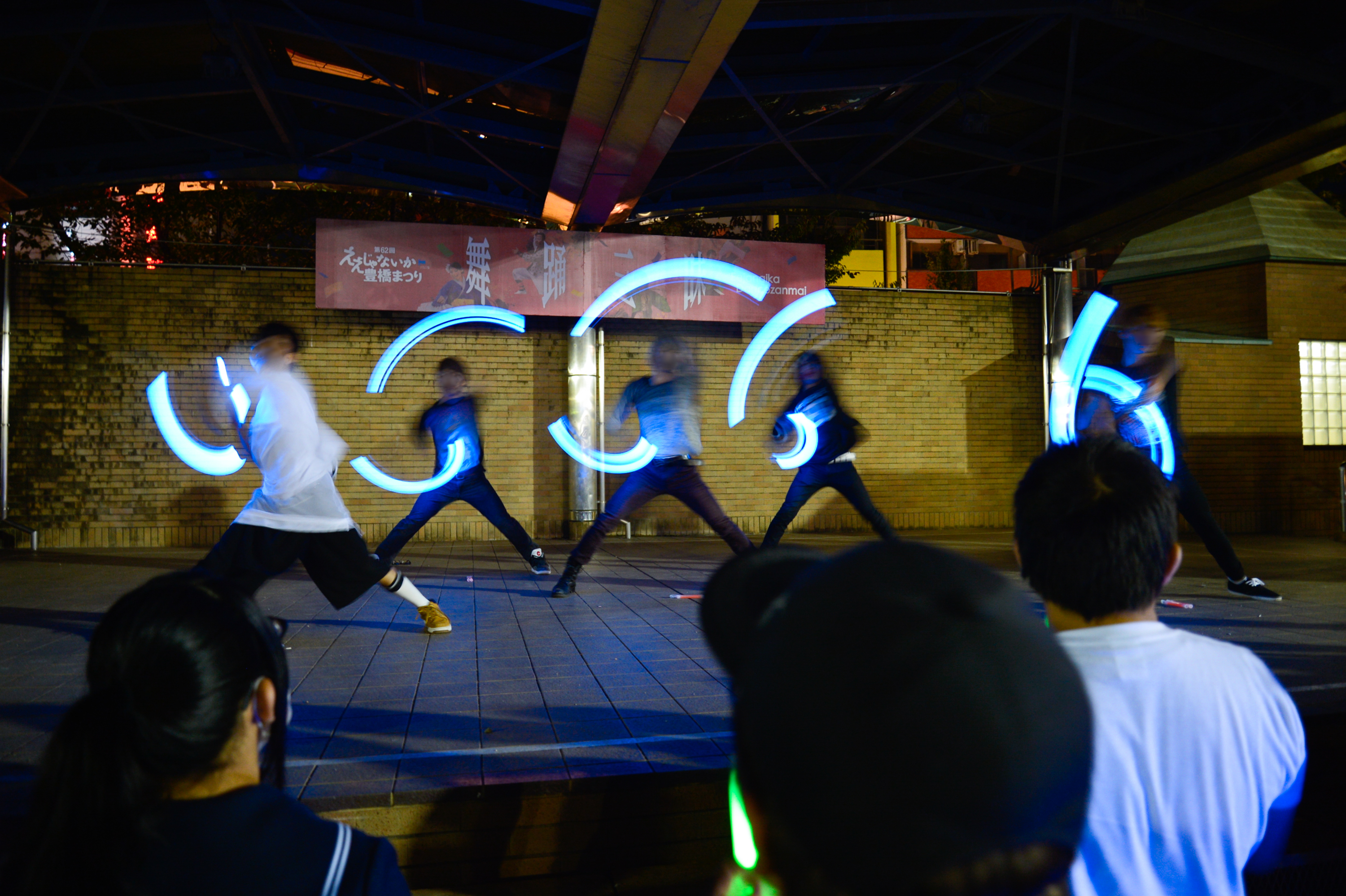 ステージ上でオタ芸を披露する打ち師集団。